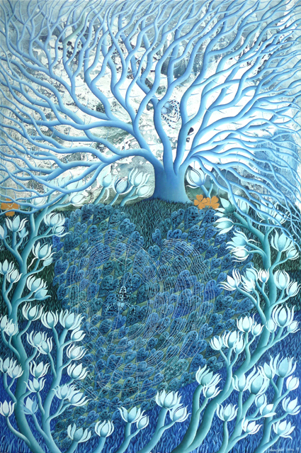 Die Aufnahme entstand am 15.9.2015 im Berliner Atelier von Helma.